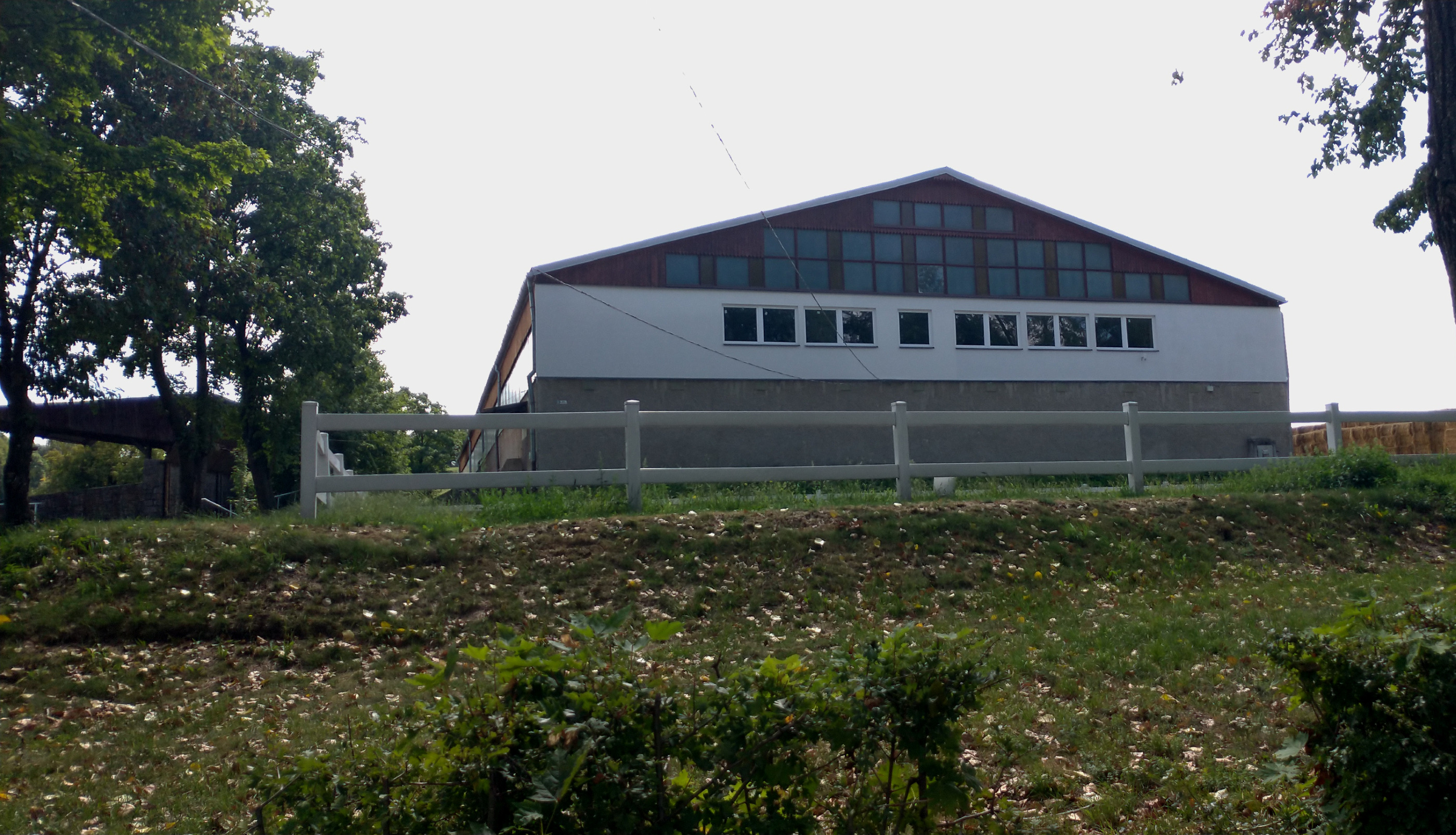 Stajnia w Chocimie